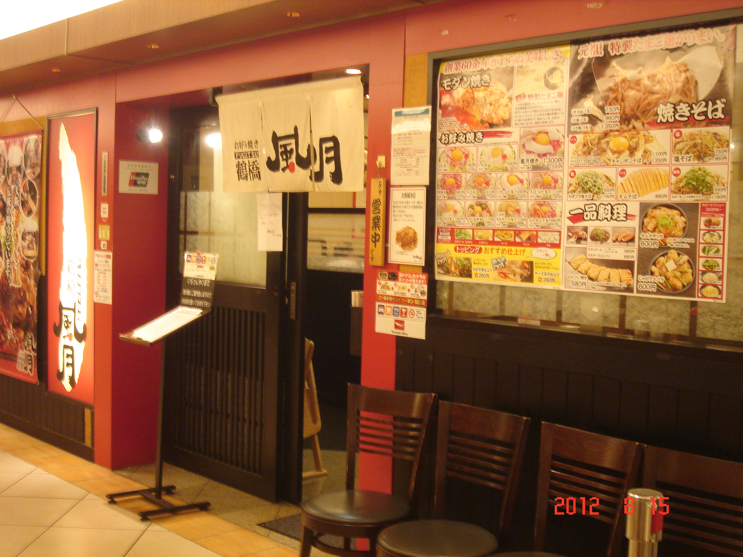 全国に展開しているお好み焼きチェーン店・鶴橋風月 ヨドバシAKIBA店。2015年にヨドバシAkiba10周年に伴うレストラン街大リニューアルのため閉店した。